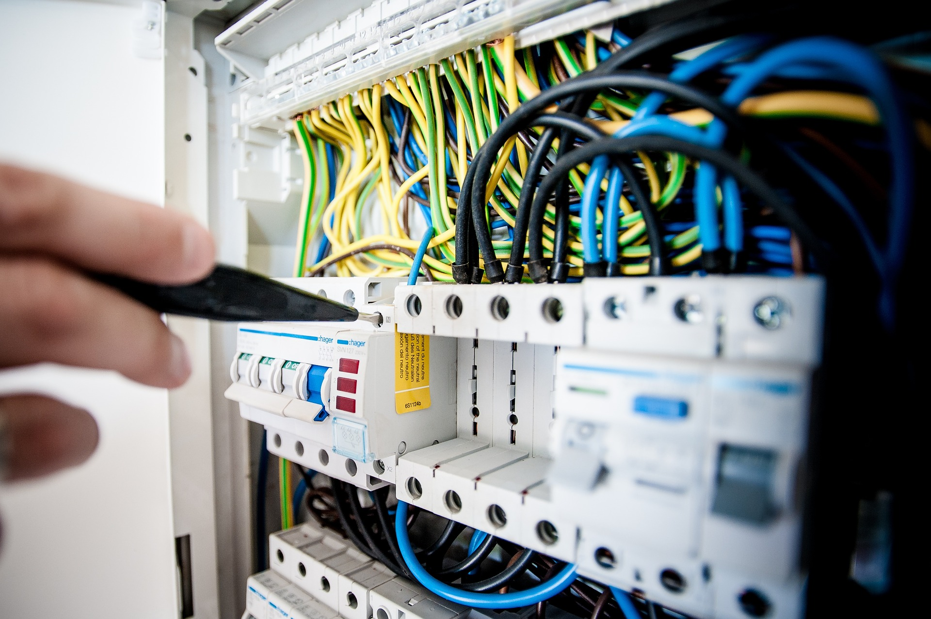 Sistemas elétricos de baixa tensão (prediais)